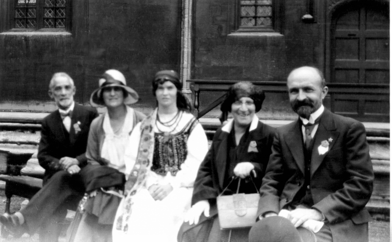 22. Esperanto-Weltkongress, Oxford 1930. Einige wichtige Teilnehmer. Links: Feliks und Lidia Zamenhof, rechts: Paul Blaise